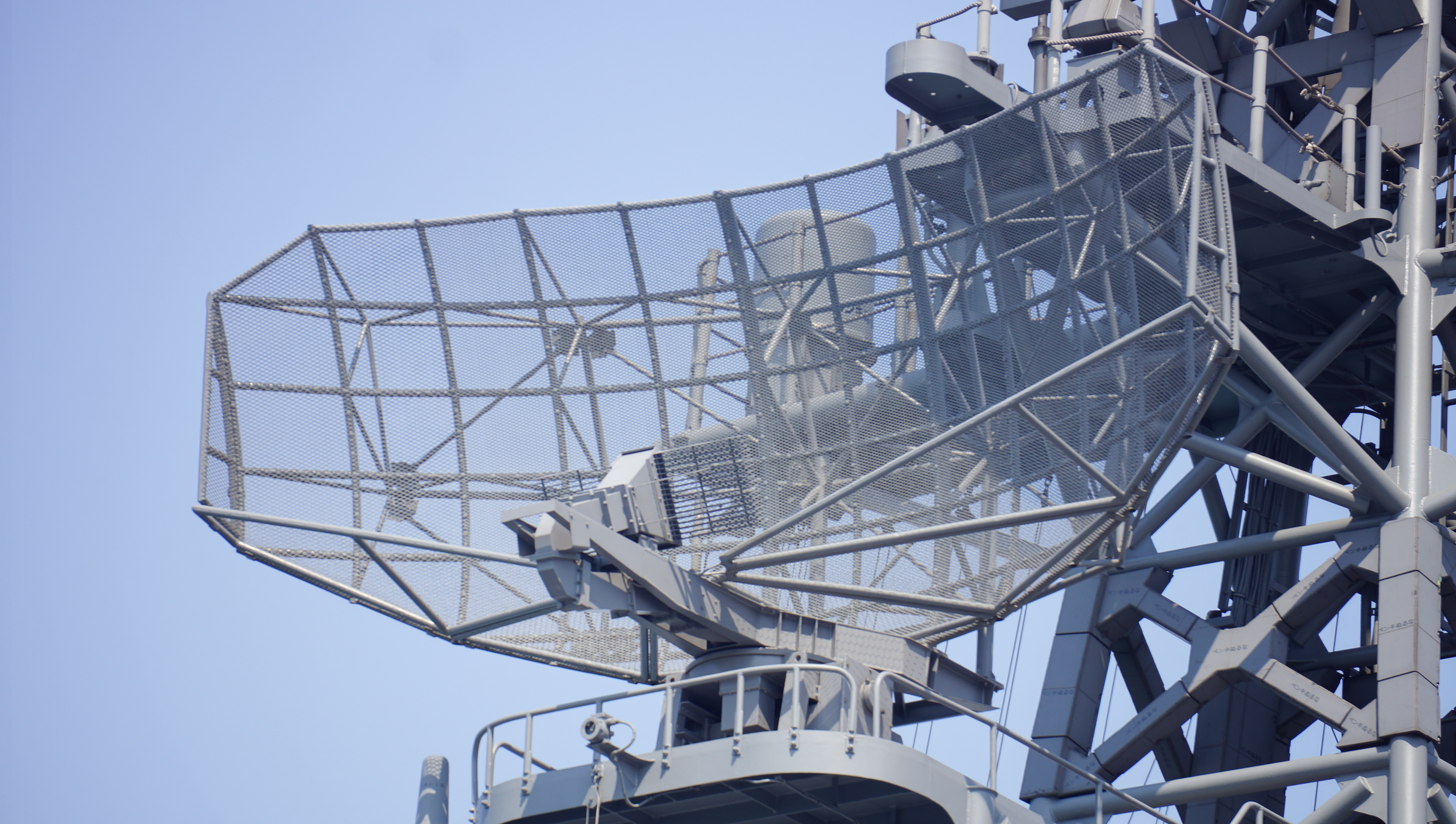 海上自衛隊 練習艦せとゆき（TV-3518） OPS-14B対空レーダー。 14年3月23日 天保山埠頭にて。